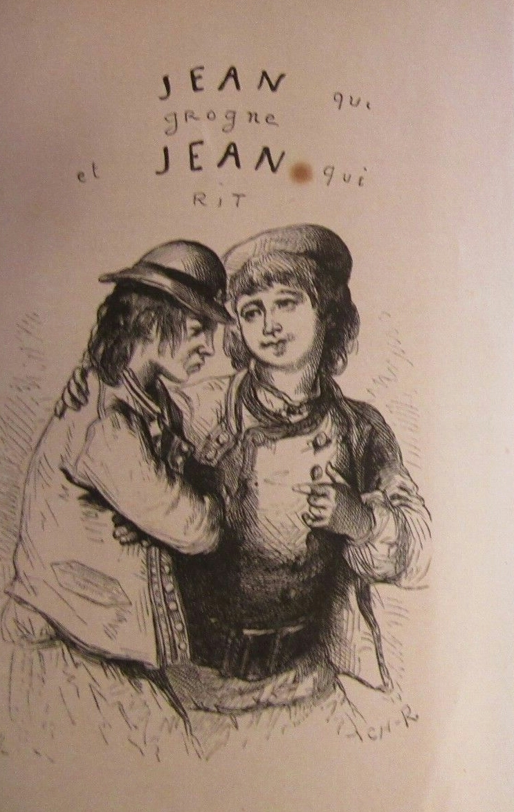 Comtesse de Ségur, Jean qui grogne et Jean qui rit (1865), illustration d'Horace Castelli.